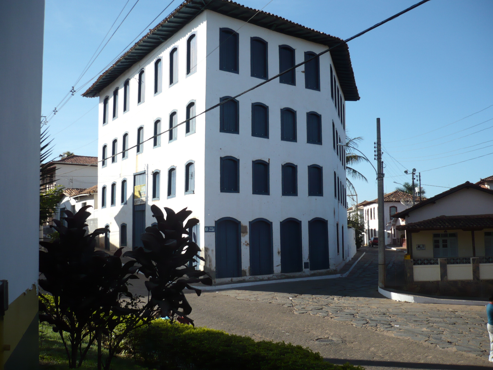 Sobrado de pau-a-pique em estilo barroco.O "Sobradão" é formado por um único bloco de construção, em quatro pavimentos com estrutura de madeira e taipa. Possui 59 janelas e oito portas, sendo que a principal mede 3,60m de altura